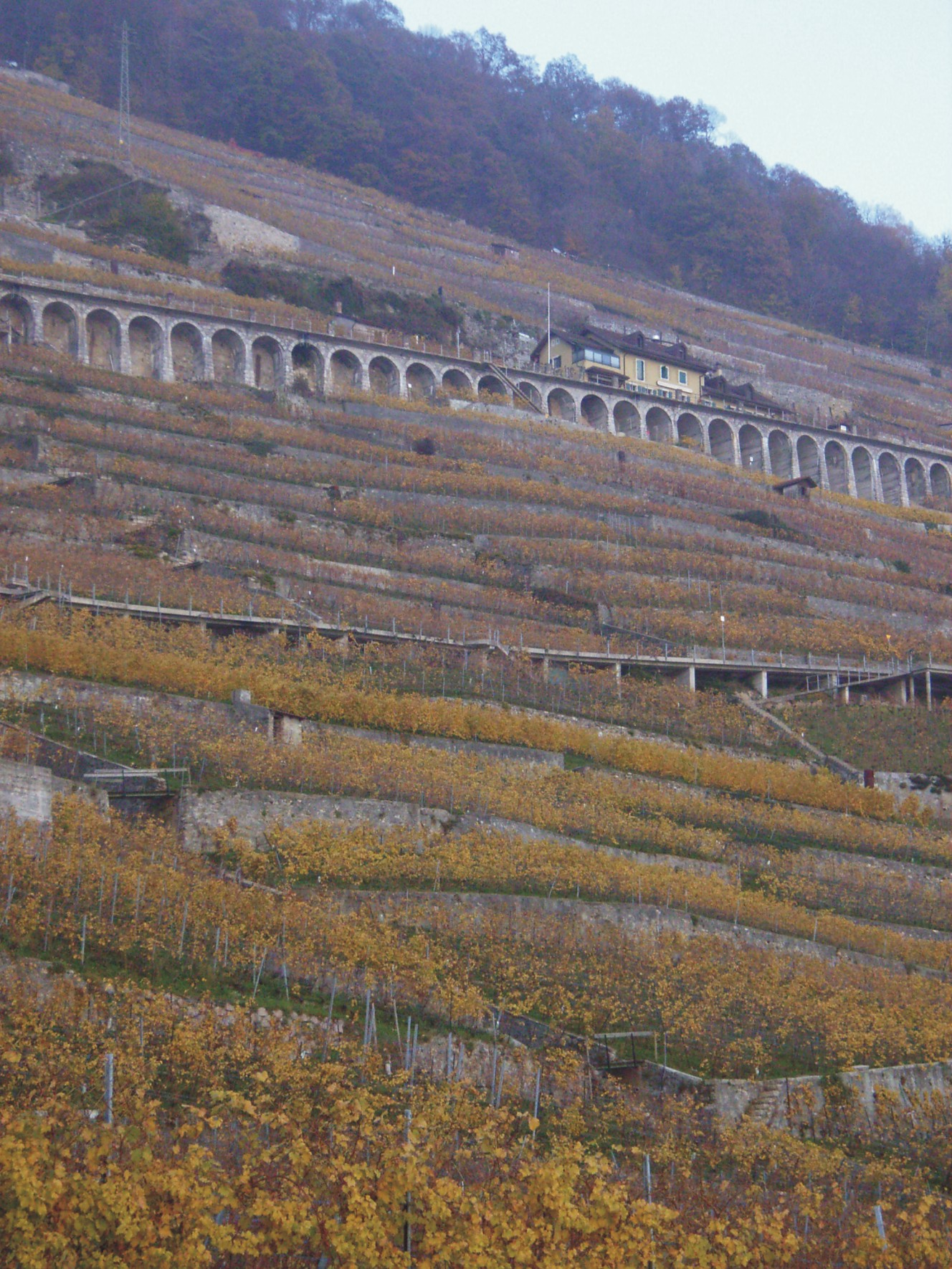 Weinberge im Lavaux mit Strasse, Genfer See (Kanton Waadt, Schweiz)